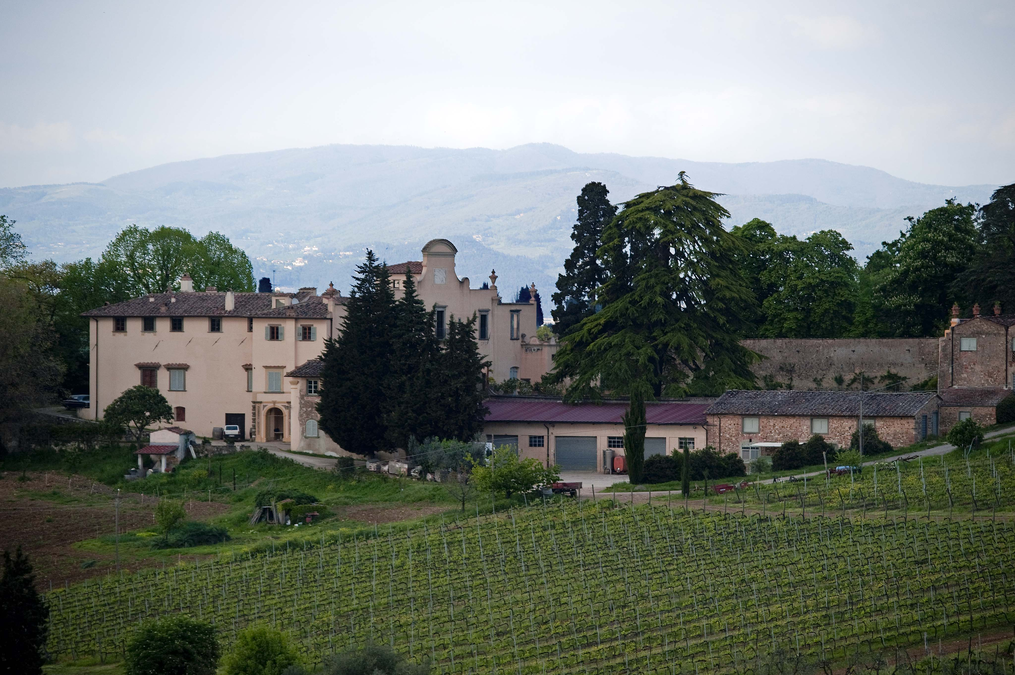 Panorama di Villa Cigliano - San Casciano in Val di Pesa - Firenze